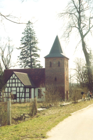 Charnowo - rzymskokatolicki kościół filialny p.w. Znalezienia Krzyża Świętego, XV, XVIII, XIX, wraz z otoczeniem